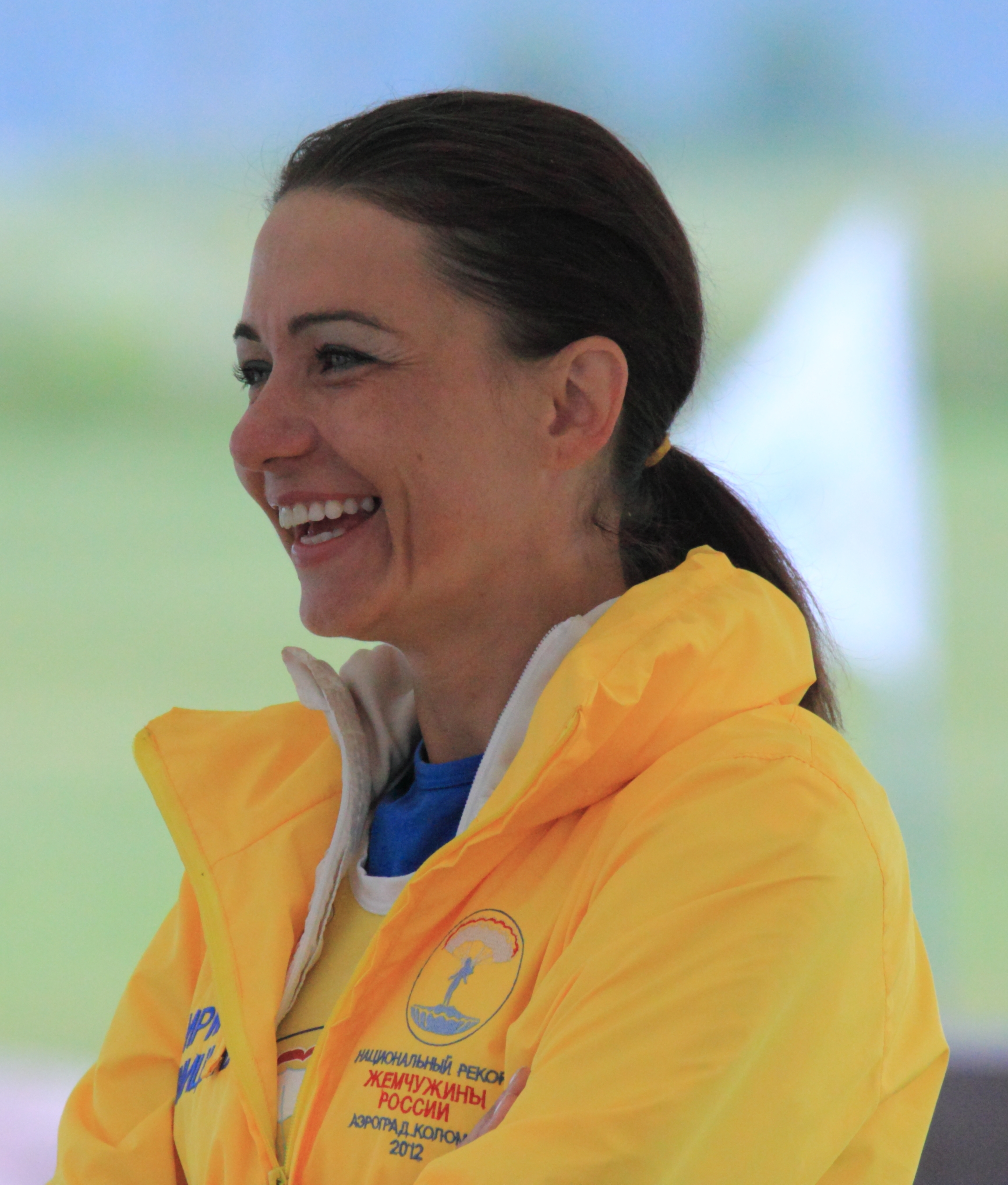 Синицина, Ирина Владимировна (Денис Ким, Аэроград Коломна) фото1